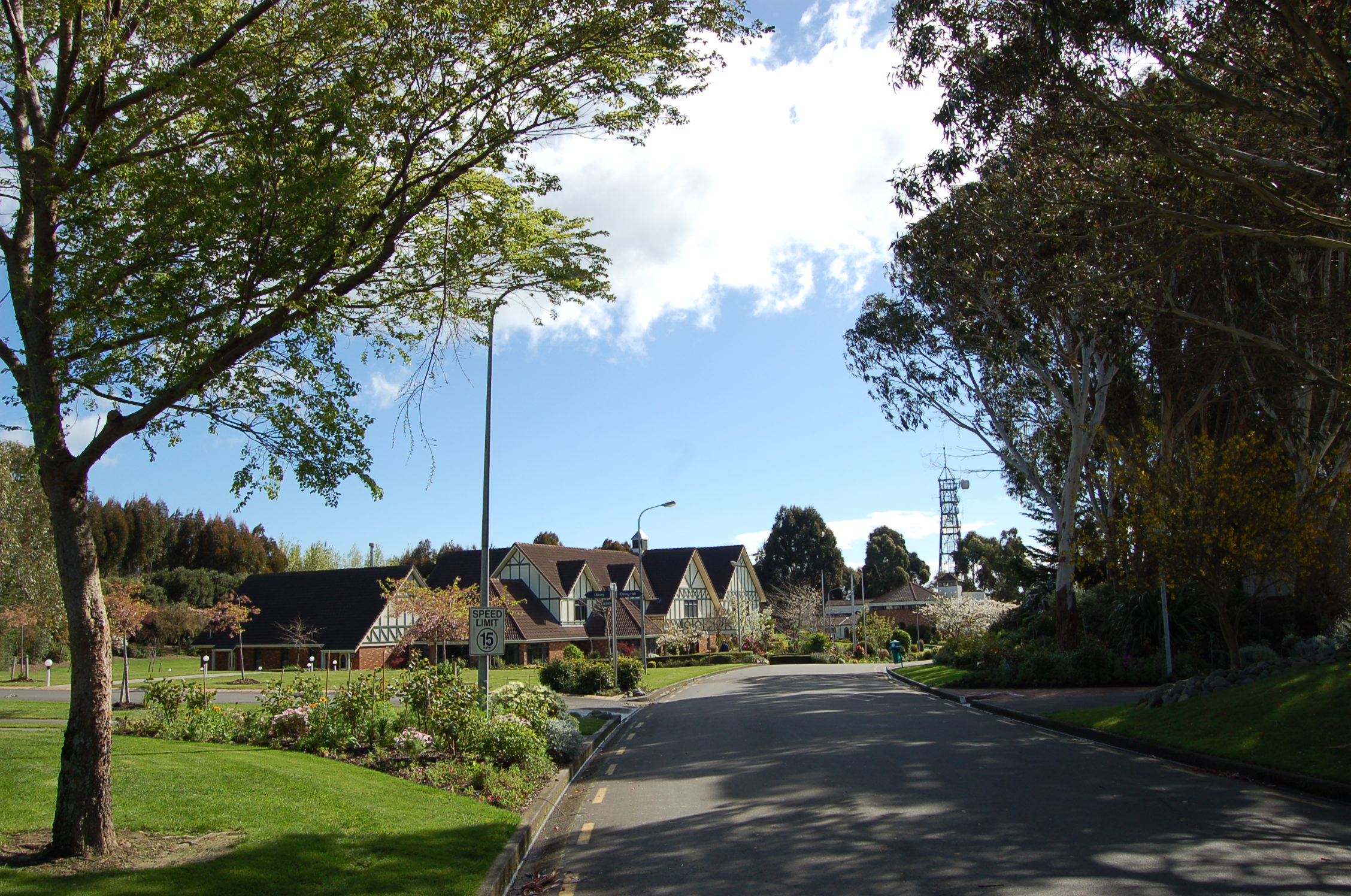 Кампус IPC Tertiary Institute, Palmerston North, New Zealand (Новая Зеландия)